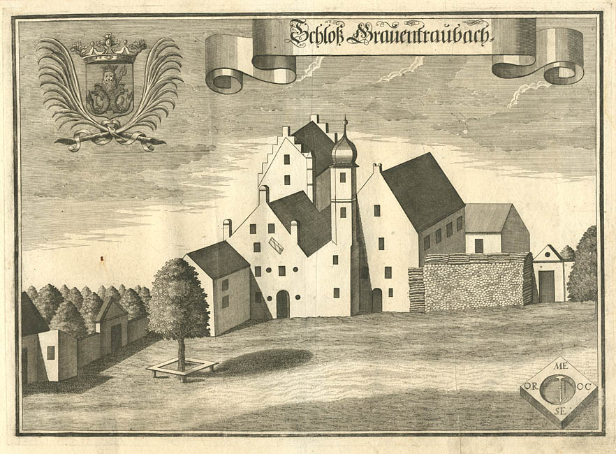 “Schloß Grauentraubach” (Grafentraubach), aus: Beschreibung des Churfürsten- u. Hertzogthumbs Ober- und Nidern Bayrn. Rentamt Landshut. – Gericht Kirchberg, 1723